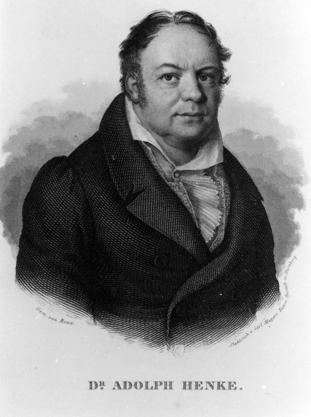 Adolph Henke (1775–1843), deutscher Physiologe und Pathologe, Begründer der Rechtsmedizin. Stich von Carl Mayers Kunstanstalt in Nürnberg nach einem Gemälde von Roux